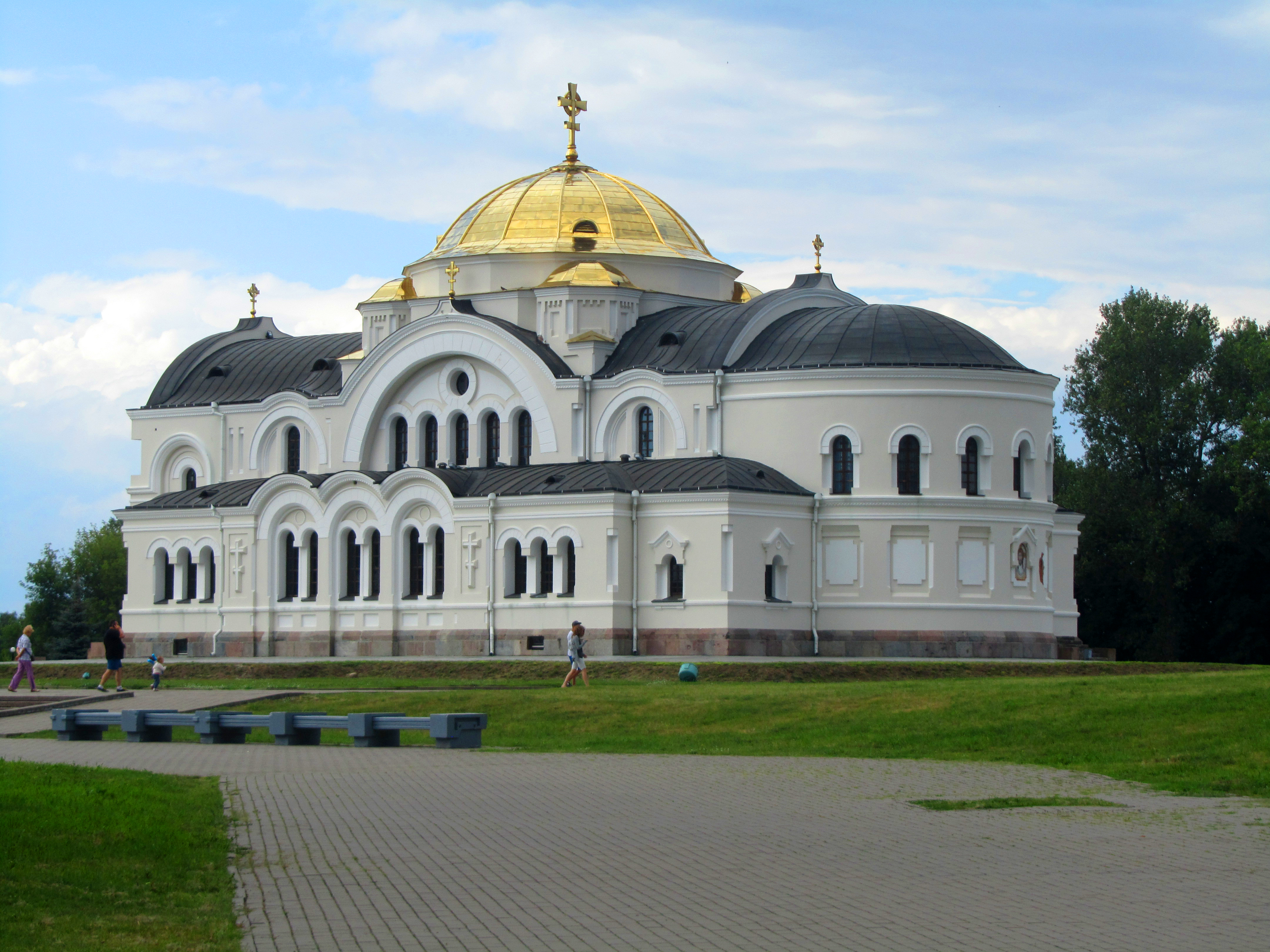 Беларуская (тарашкевіца): Мікалаеўская царква. г. Берасьце This is a photo of Belarusian heritage monument. Reference number: 113Г000005 ( WLM)